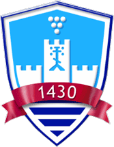 Blason de la ville de Smederevo en Serbie